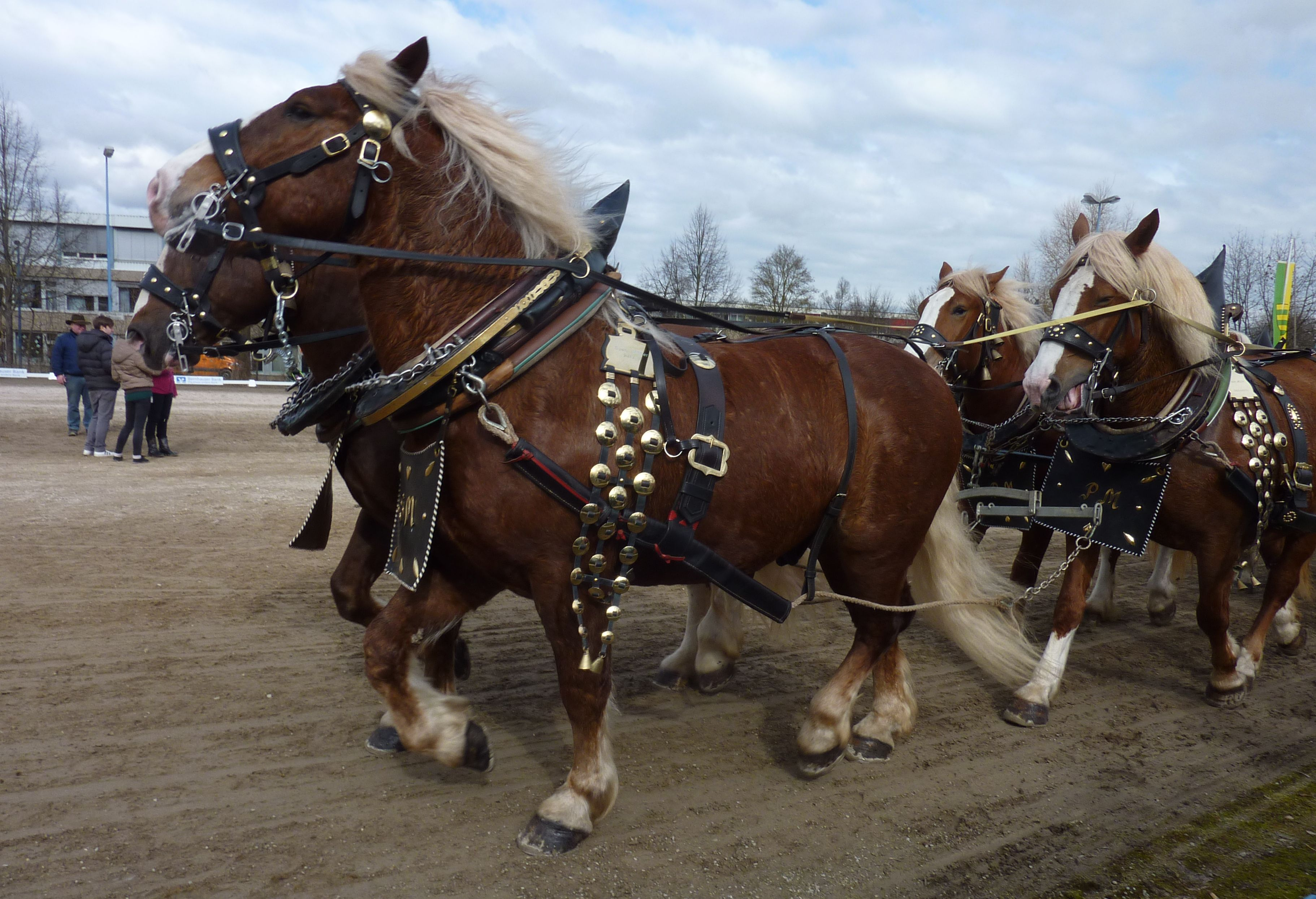 Pferdemarkt Bernhausen 2014